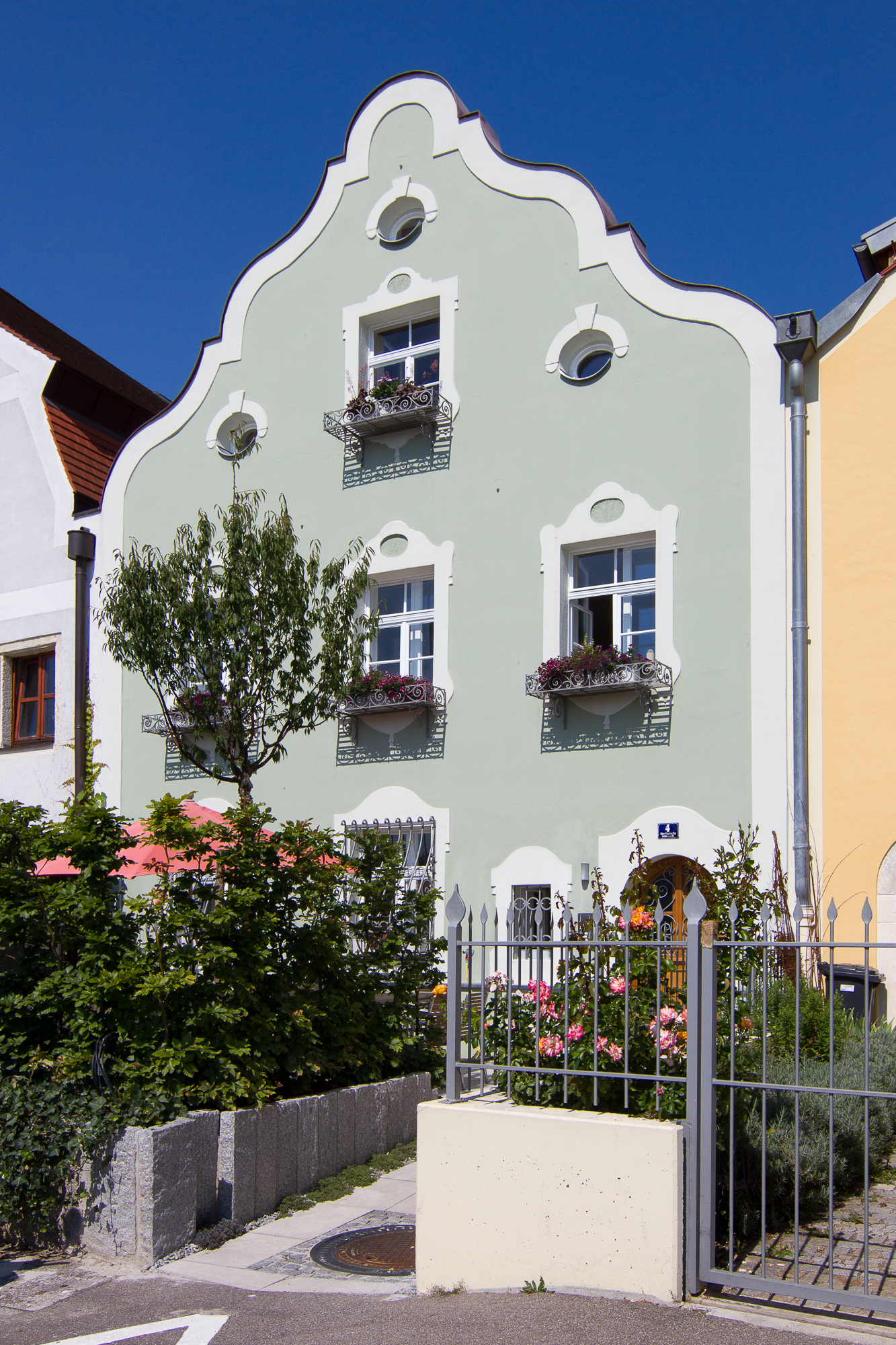 Ehem. Fischerhaus; zweigeschossiger und giebelständiger Satteldachbau mit Schweifgiebel und Putzgliederungen, 18. Jh., Umbau und Fassade neubarock, 1907This is a photograph of an architectural monument.